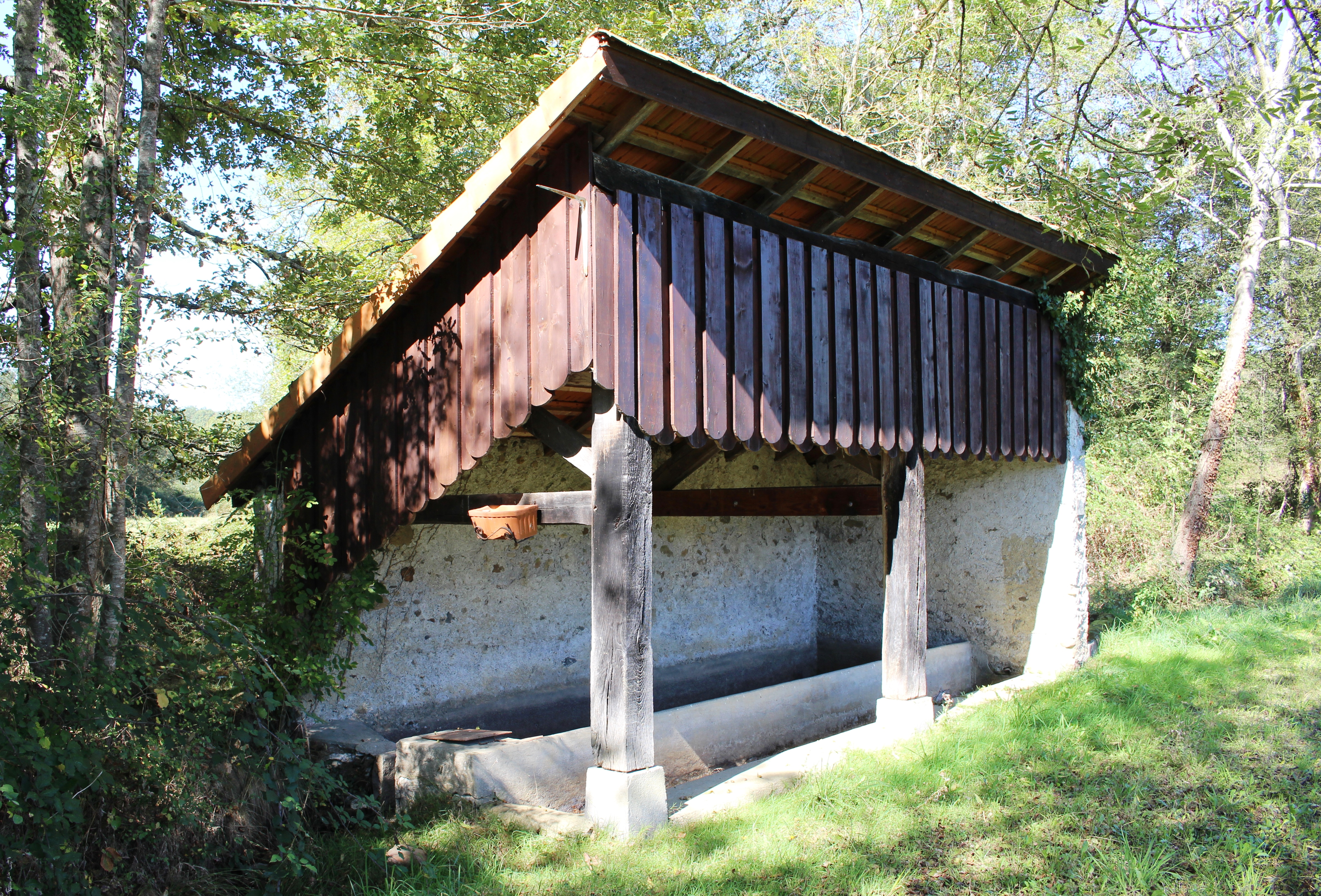 Lavoir de Saint-Paul (Hautes-Pyrénées)